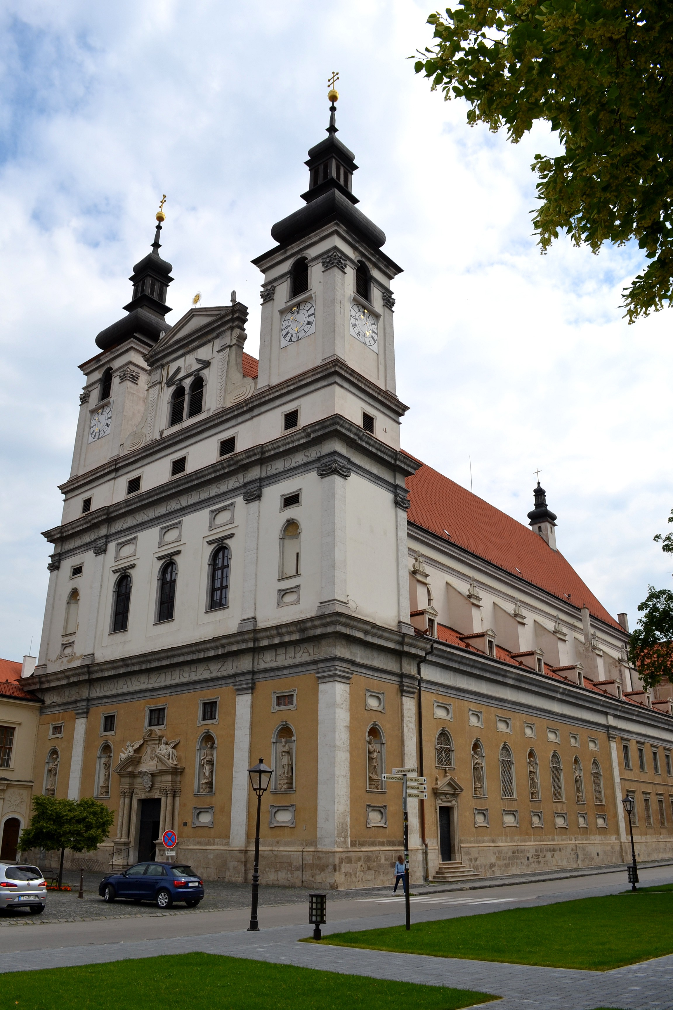 Celkový pohľad na katedrálu